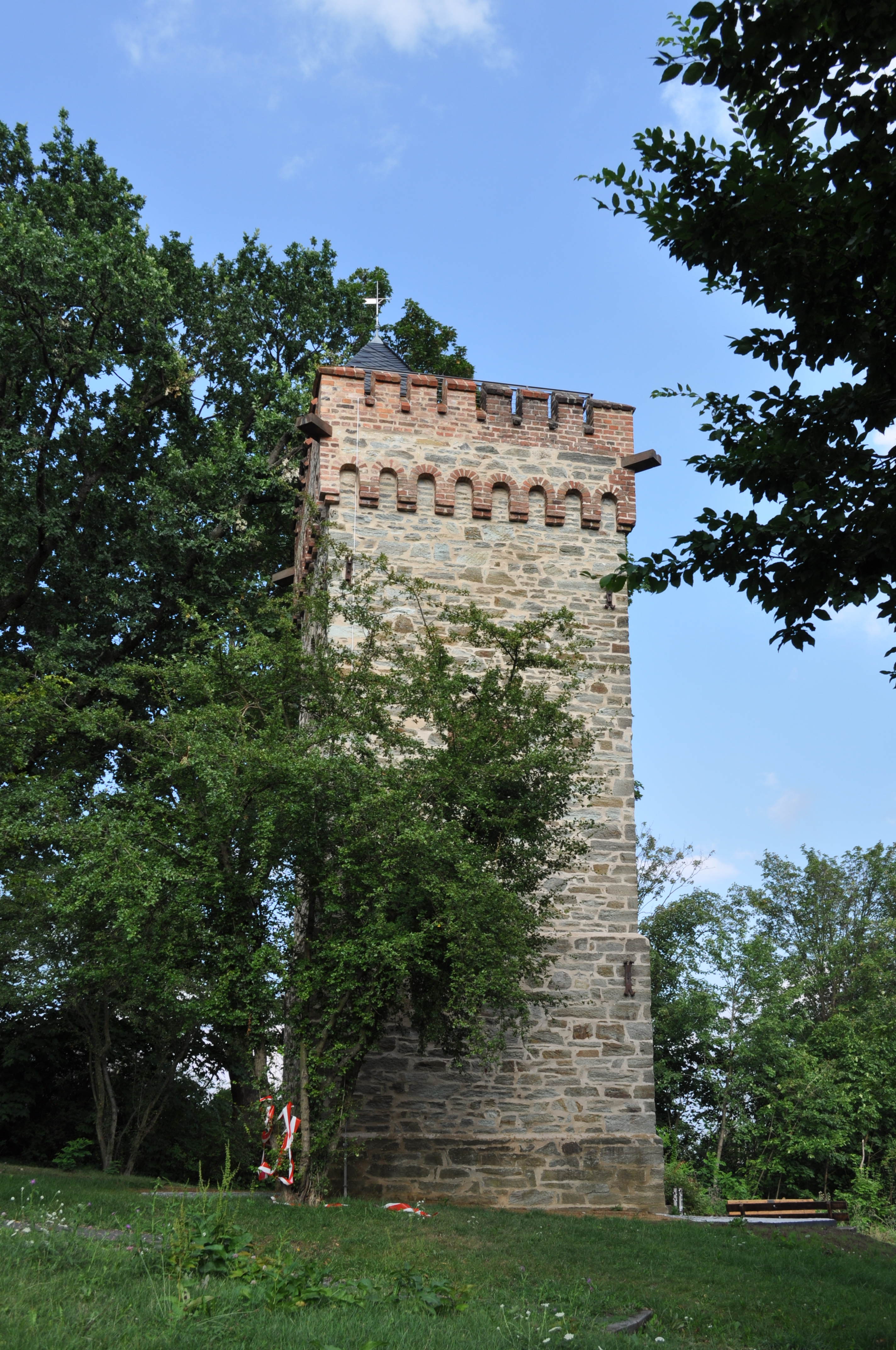 Burgbergturm in Bad Soden, Seitenansicht